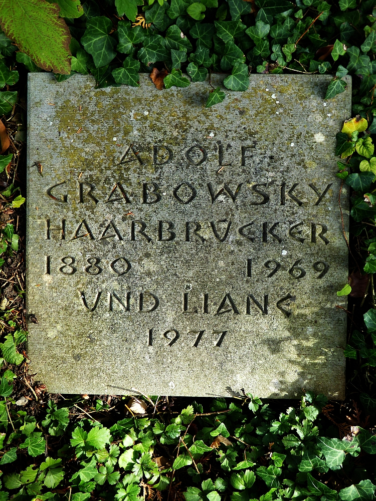 Adolf Grabowsky-Haarbrücker (1880–1969), Politikwissenschaftler, Theoretiker der Geopolitik, Lyriker, Dramatiker, Hörspielautor Übersetzer. Grab auf dem Friedhof Bromhübel in Arlesheim, Basel-Land